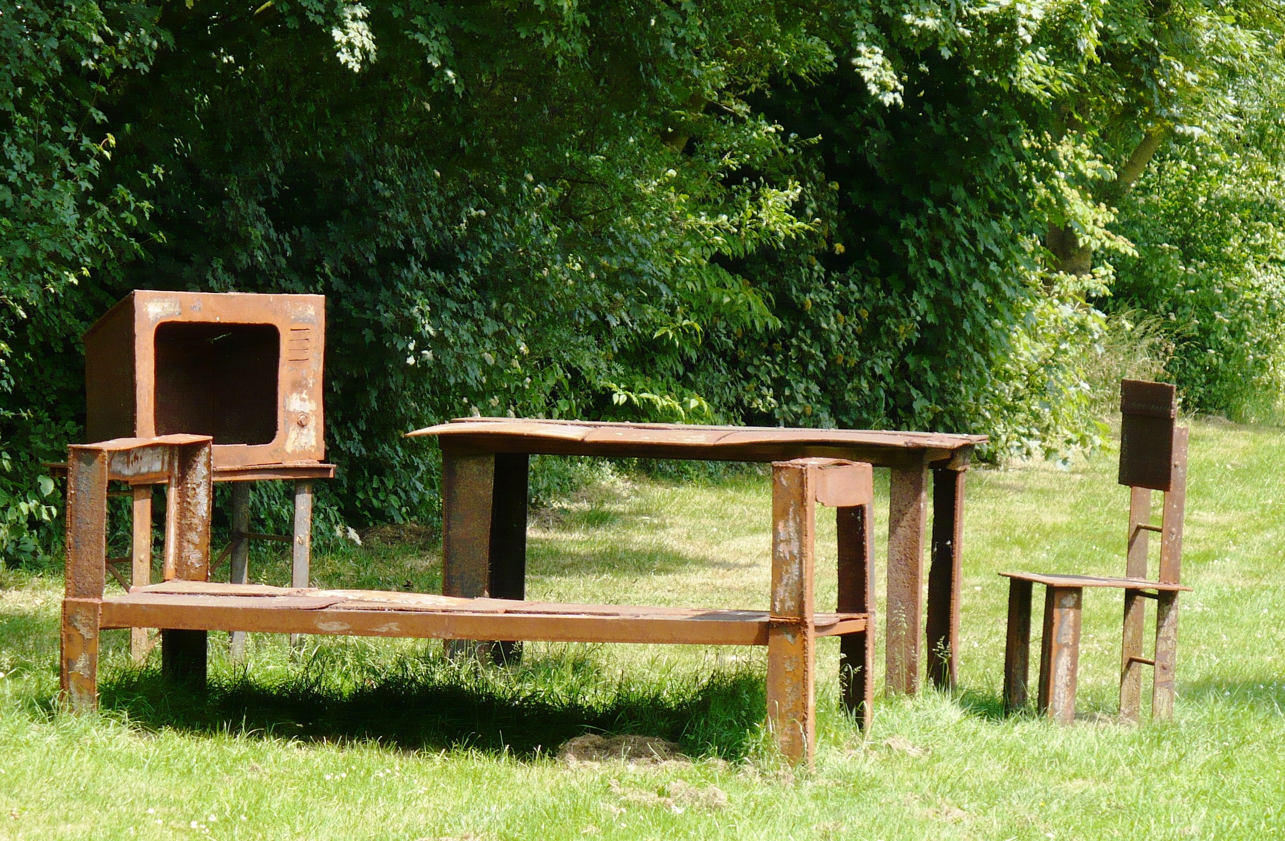 Skulptur: "Raum im Raum" im Landschaftspark der Justizvollzugsanstalt Geldern - Pont